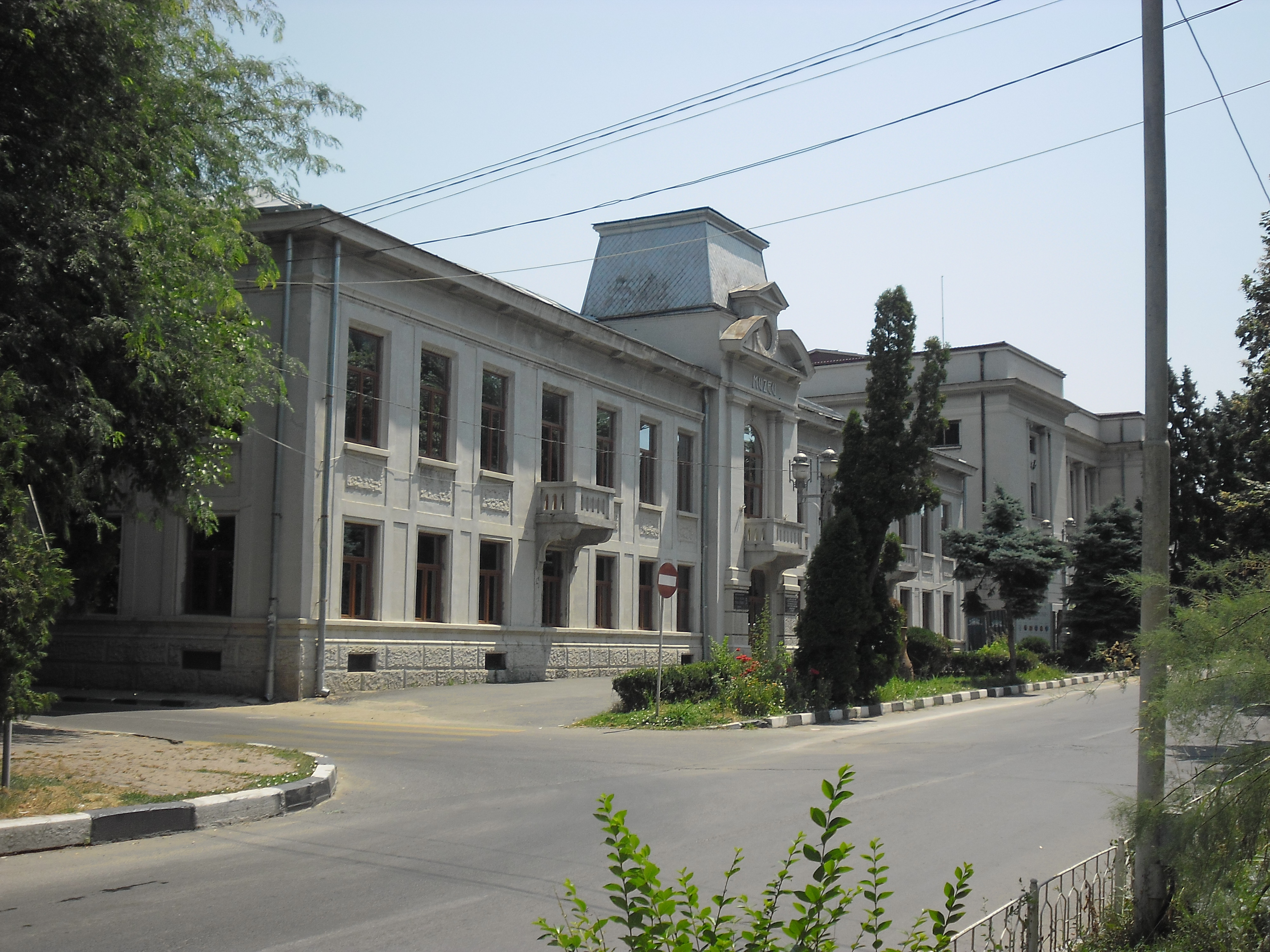 Prefectura, azi Muzeul județean